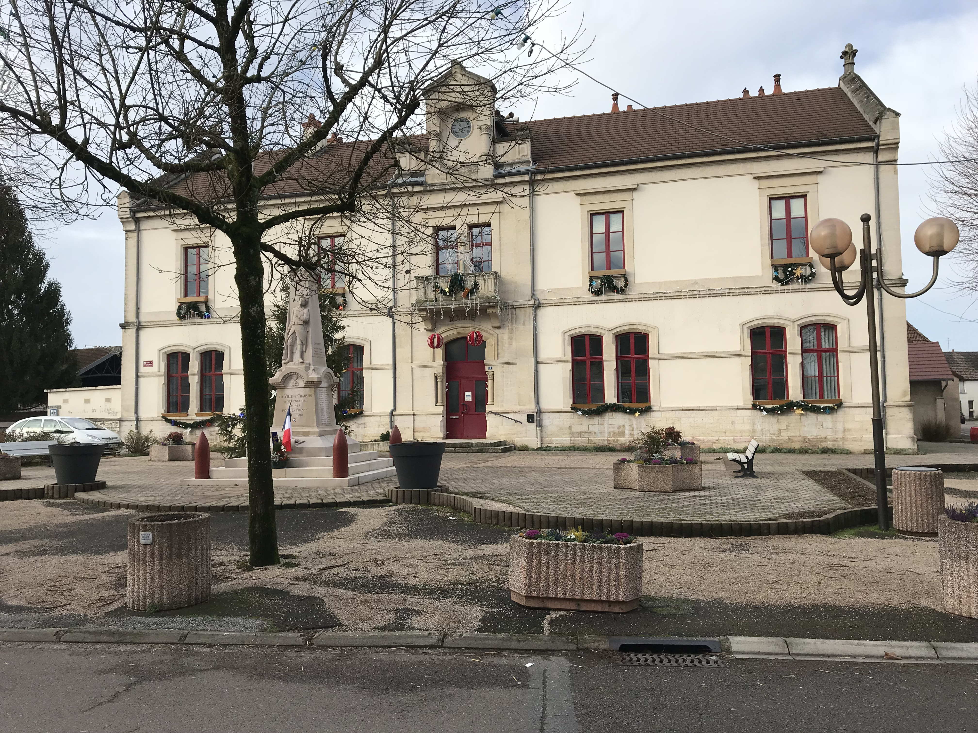 Image de Chaussin (Jura) en janvier 2018.